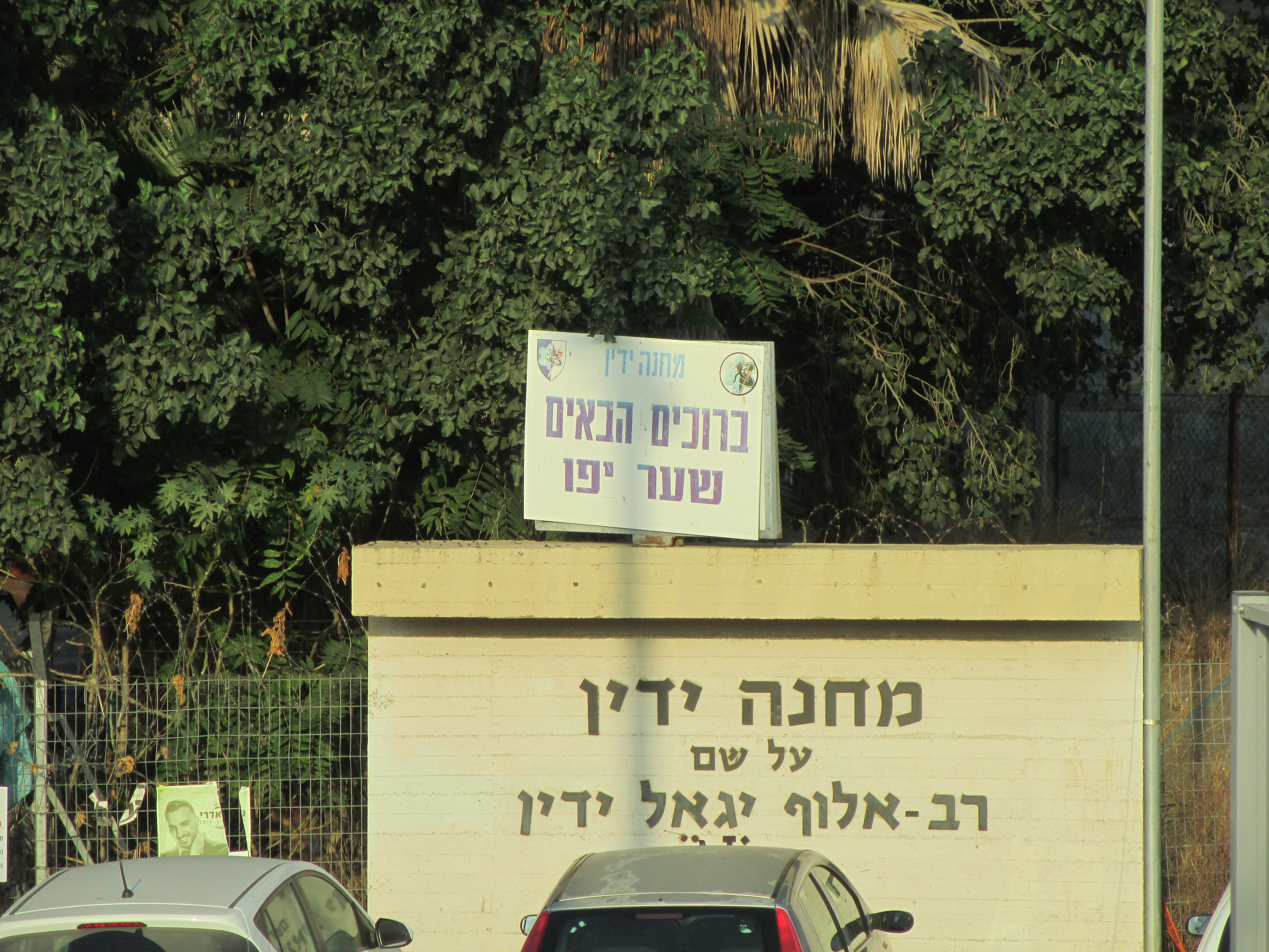 שער יפו במחנה ידין בצריפין